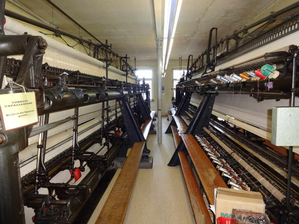 Schiffchenstickmaschine in der Schaustickerei Plauen